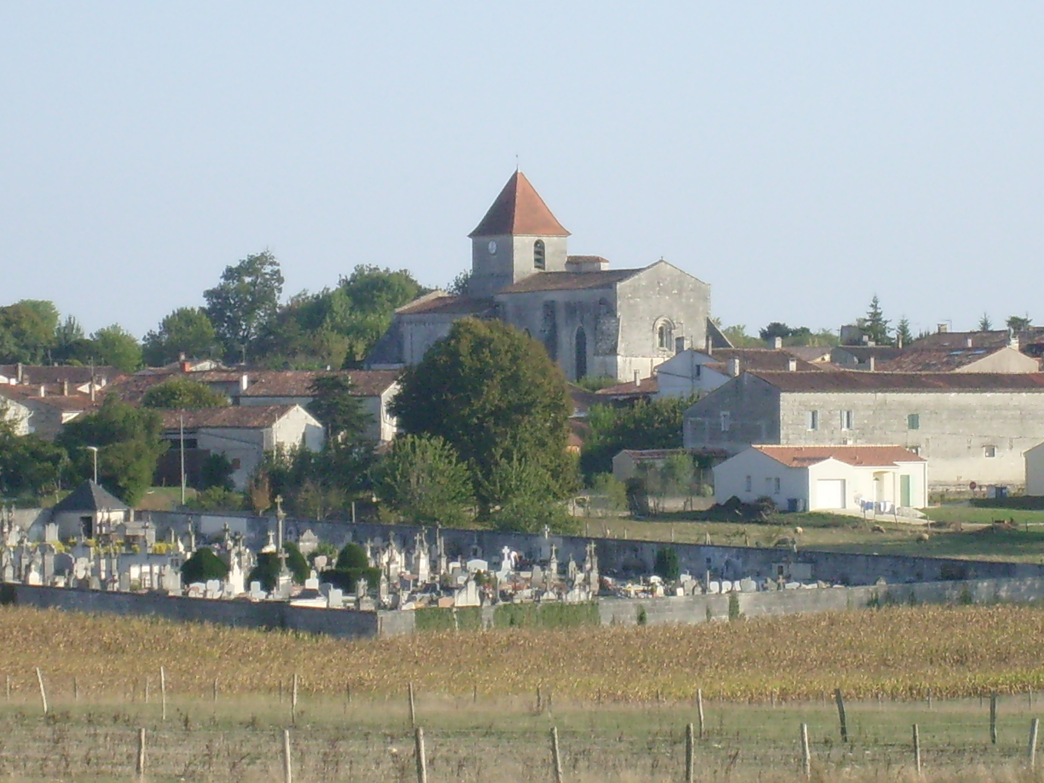 Village de Saint-Georges-des-Coteaux